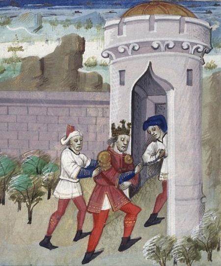 Bituit, roi des arvernes mis en prison. Miniature médiévale issue du De casibus de Boccace. XVème siècle, BnF. Folio 191.